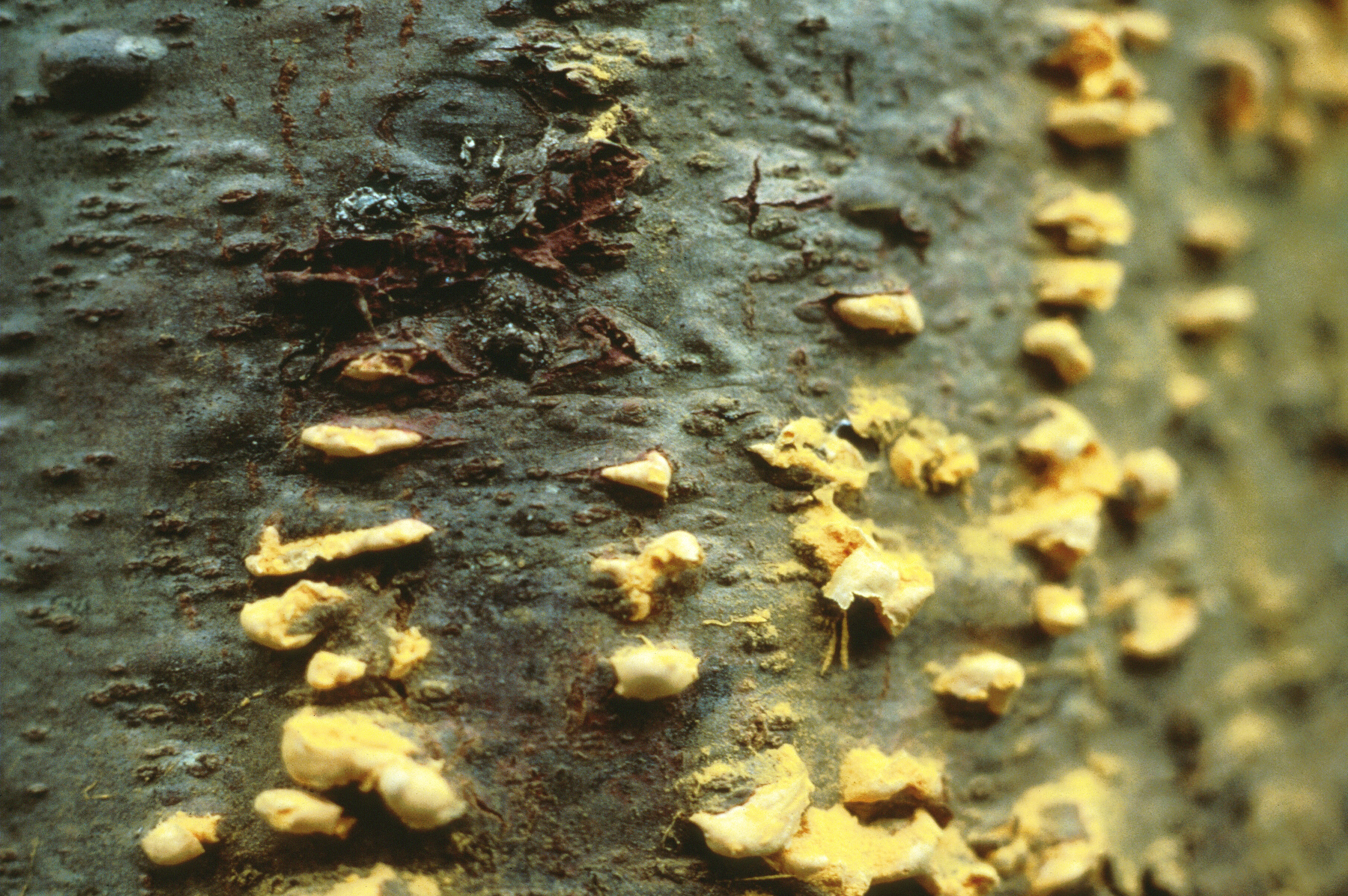 Cronartium ribicola on Pinus monticola, USDA Forest Service, Dorena Genetic Resource Center, USA